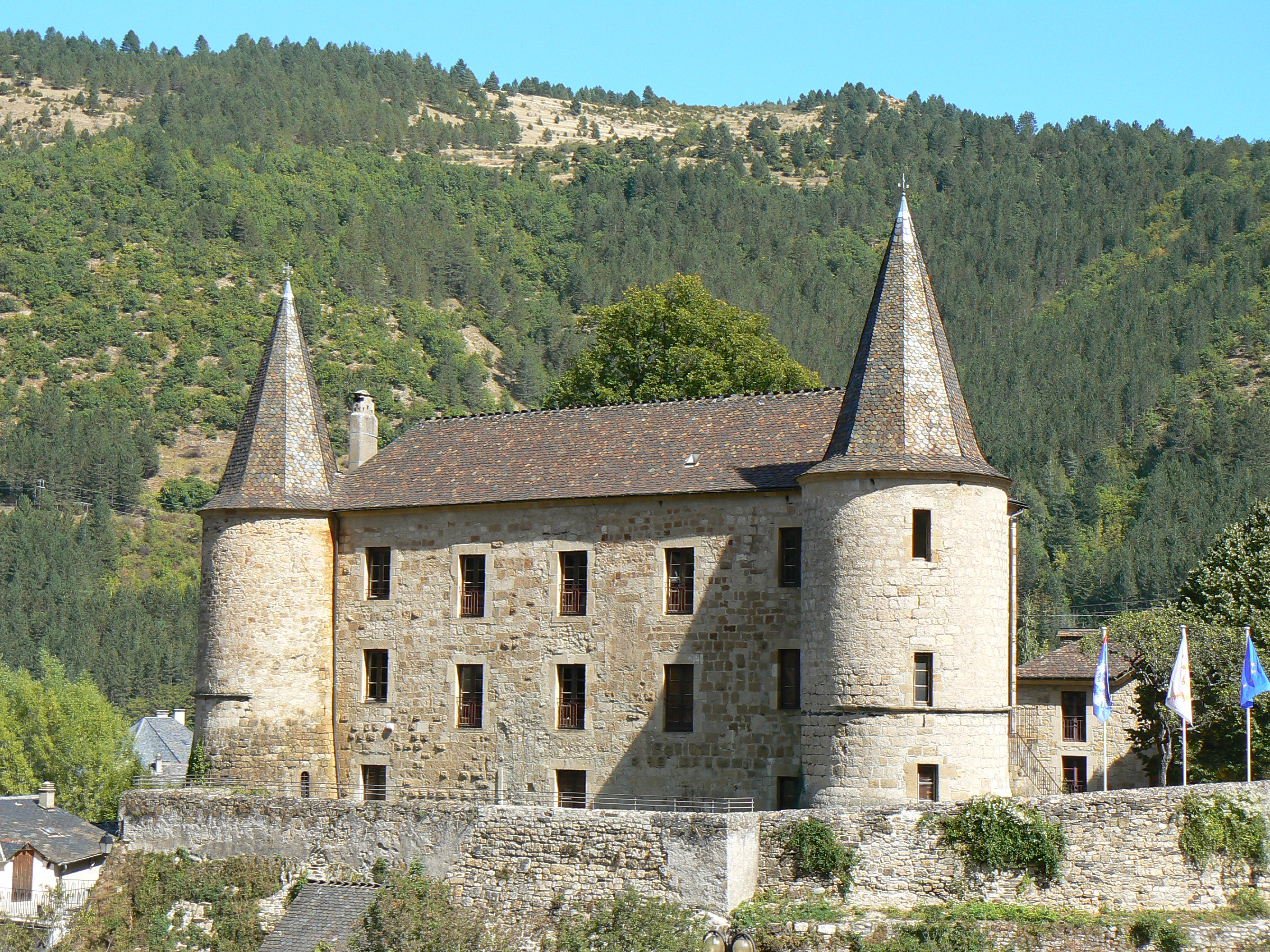 Le château de Florac en Lozère (siège du parc national des Cévennes)